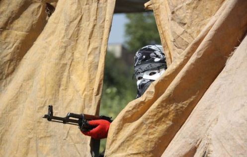 Bir Yurtsever Devrimci Gençlik Hareketi (YDG-H) üyesi özyönetim talebi nedeniyle açılan barikatların arkasında